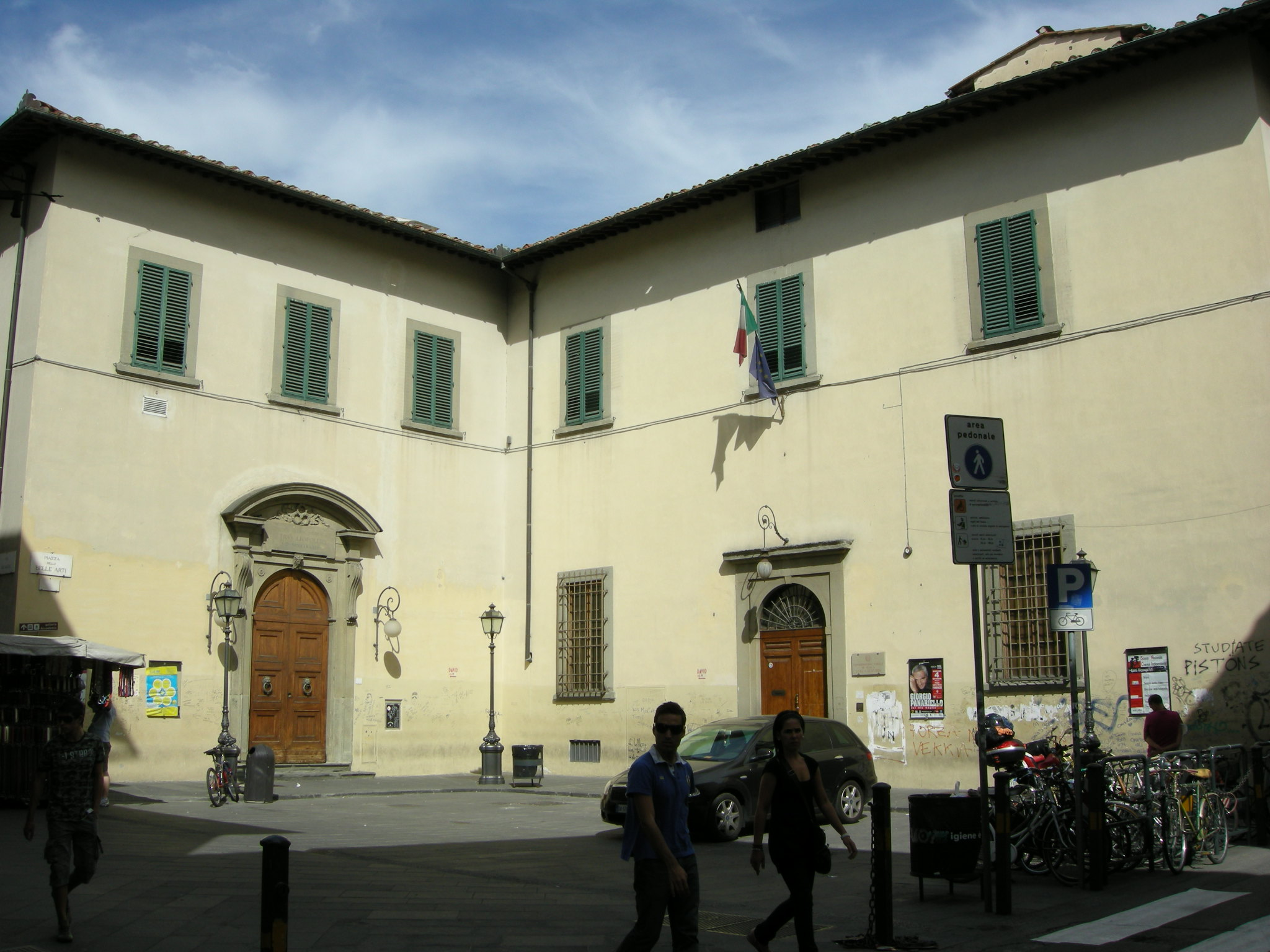 Conservatorio cherubini